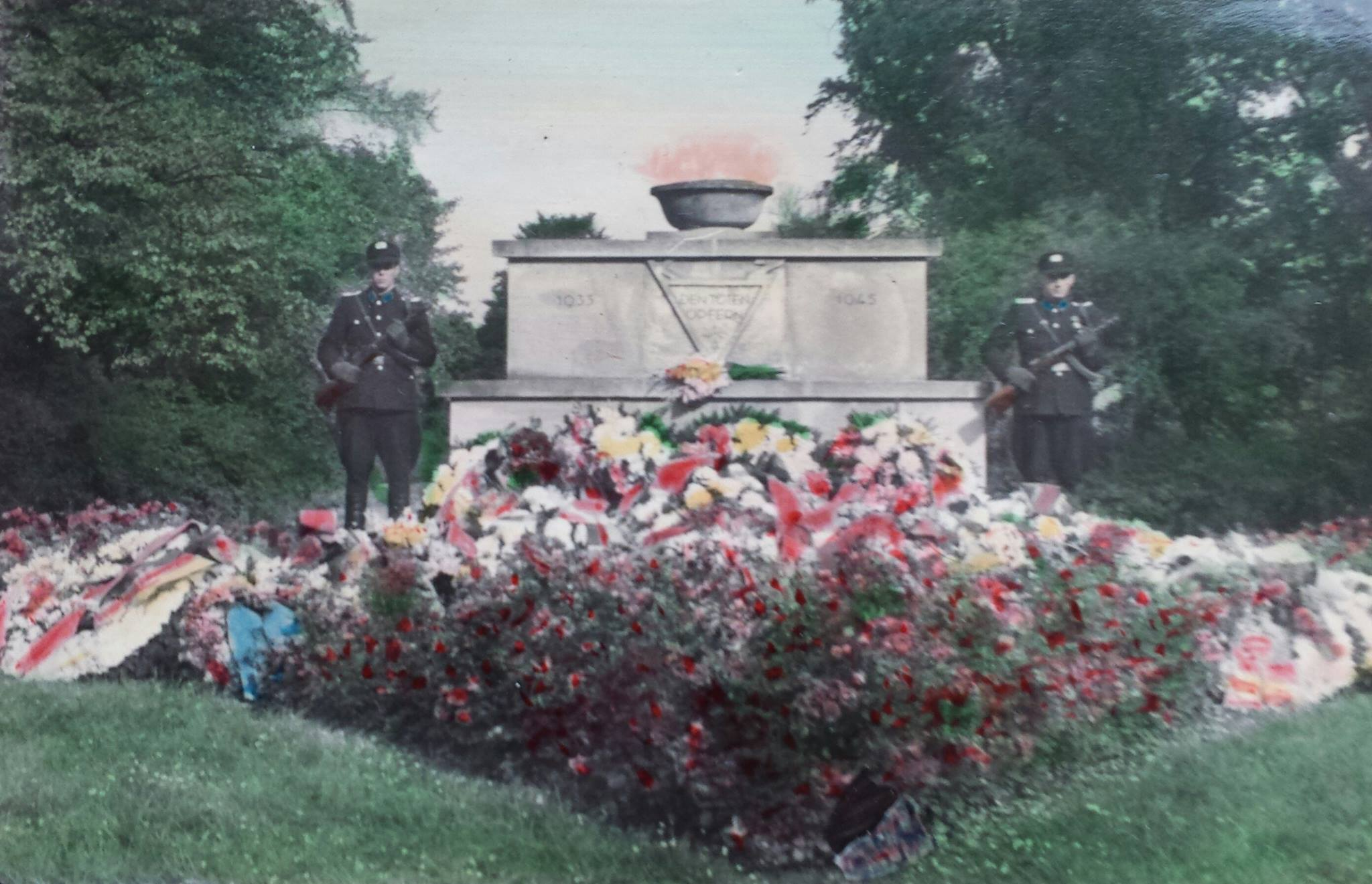 Denkmal Opfer des Faschismus in Frankfurt (Oder), Deutschland